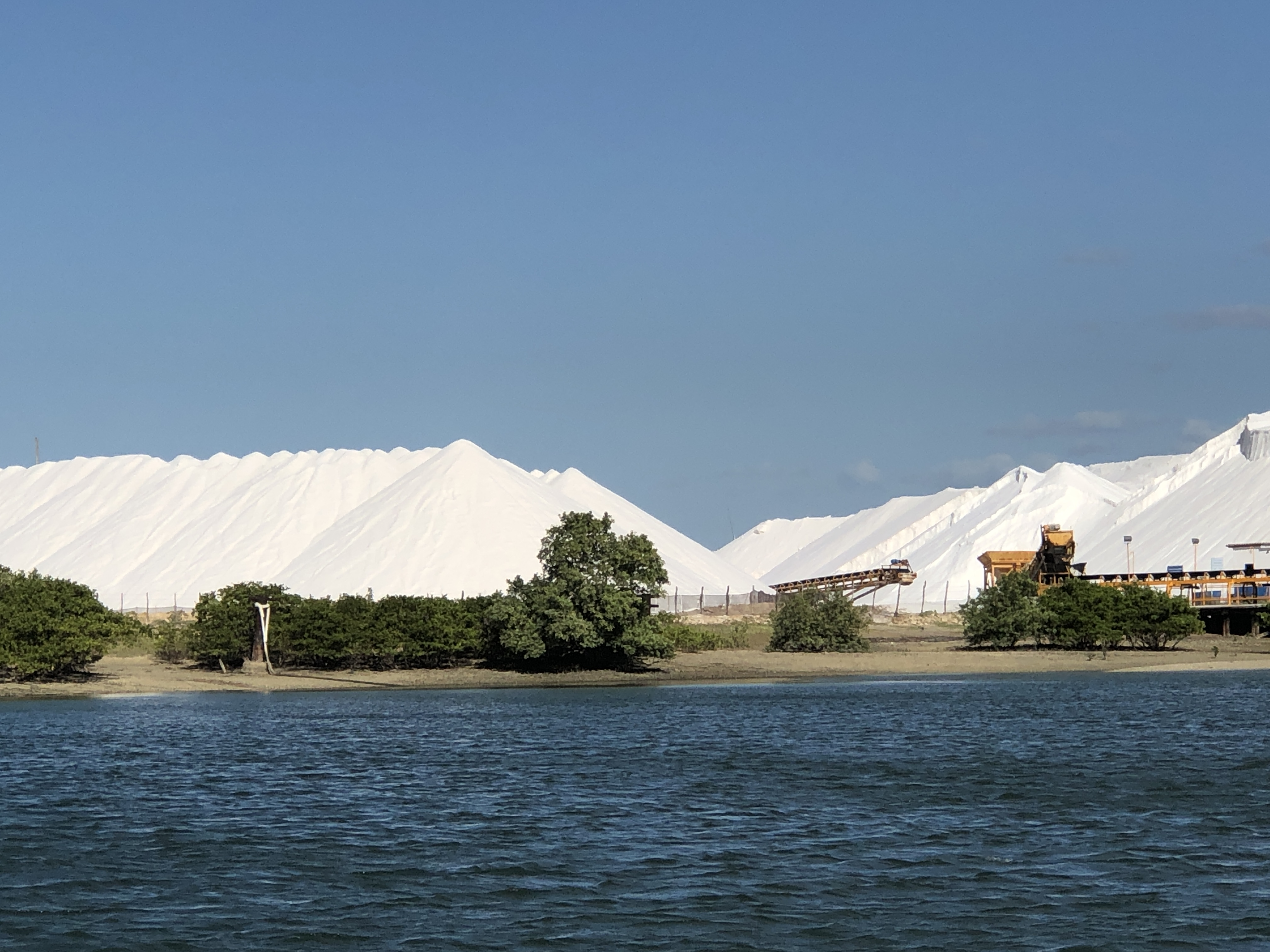 Saline